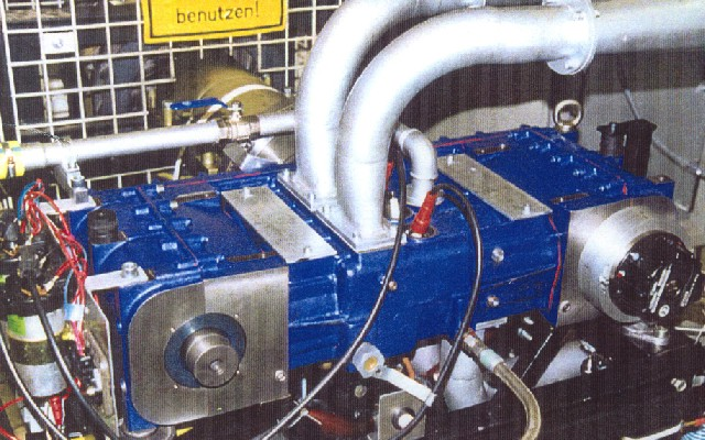 Zweitakt-Gegenkolben-Motor auf dem Prüfstand der TU Ilmenau, Bauart: Kreuzkopf-Konstruktion